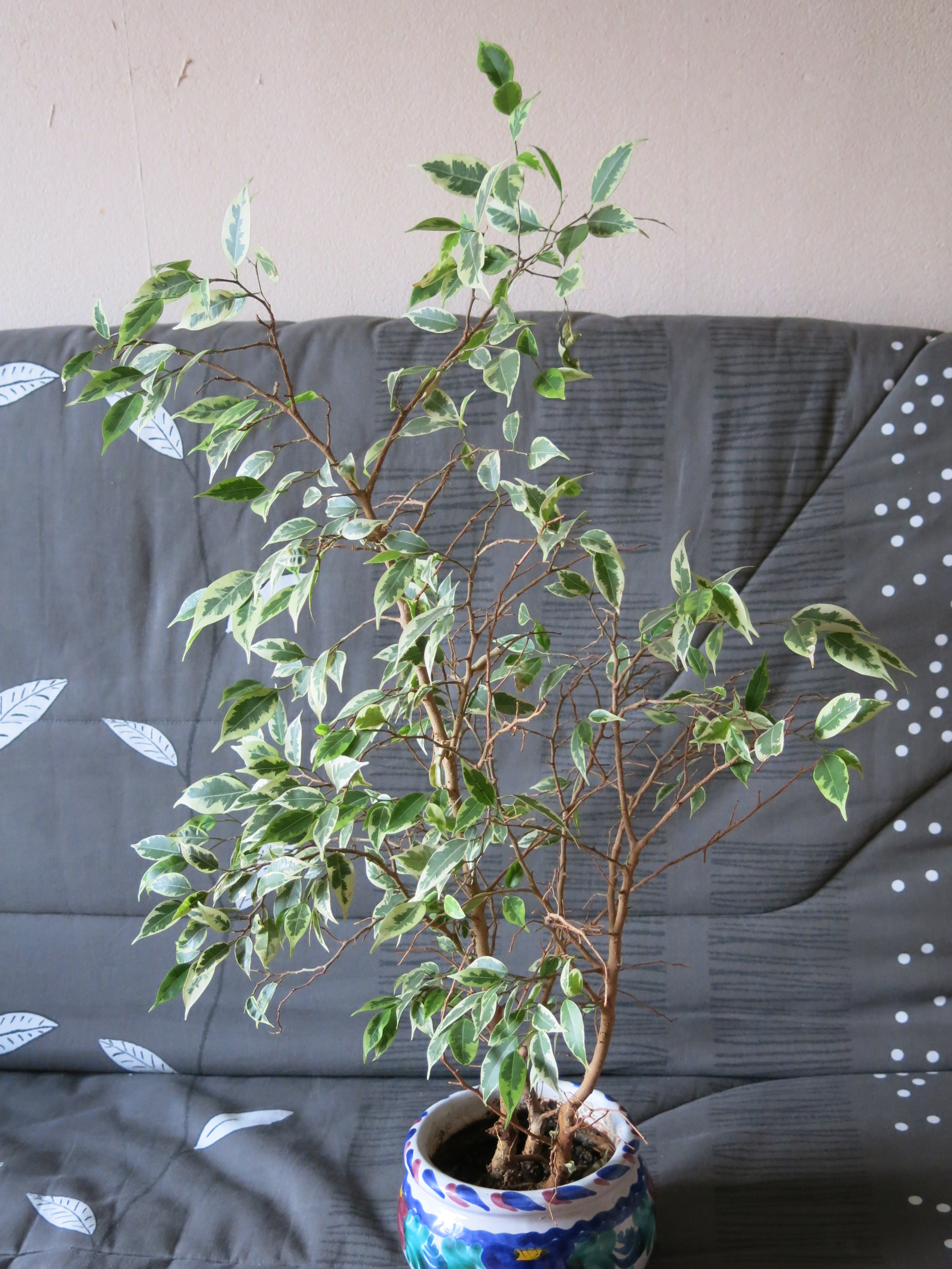 Ficus benjamina variegata in pot